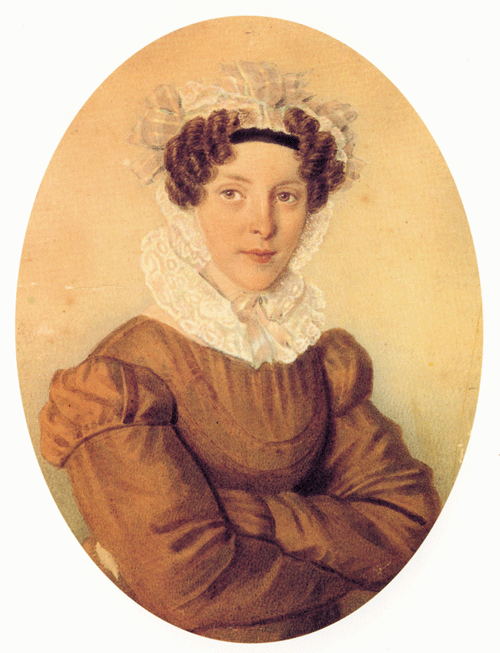 Александра Николаевна Гончарова (в замужестве Фризенгоф). Портрет неизвестного художника, конец 1820-х - начало 1830-х гг. Своячница А.С.Пушкина.